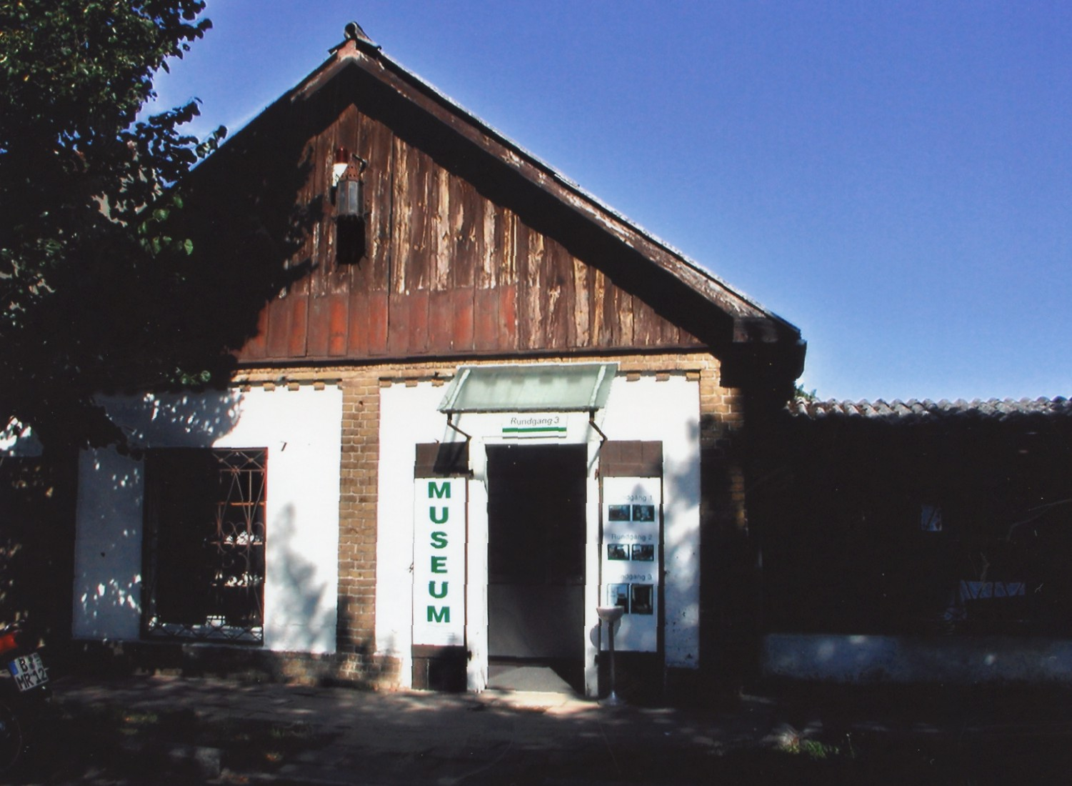 Ortsteil Wandlitz der Gemeinde Wandlitz, Aus dem früheren Milchladen ist nun ein Ausstellungsgebäude des Agrarmuseums geworden